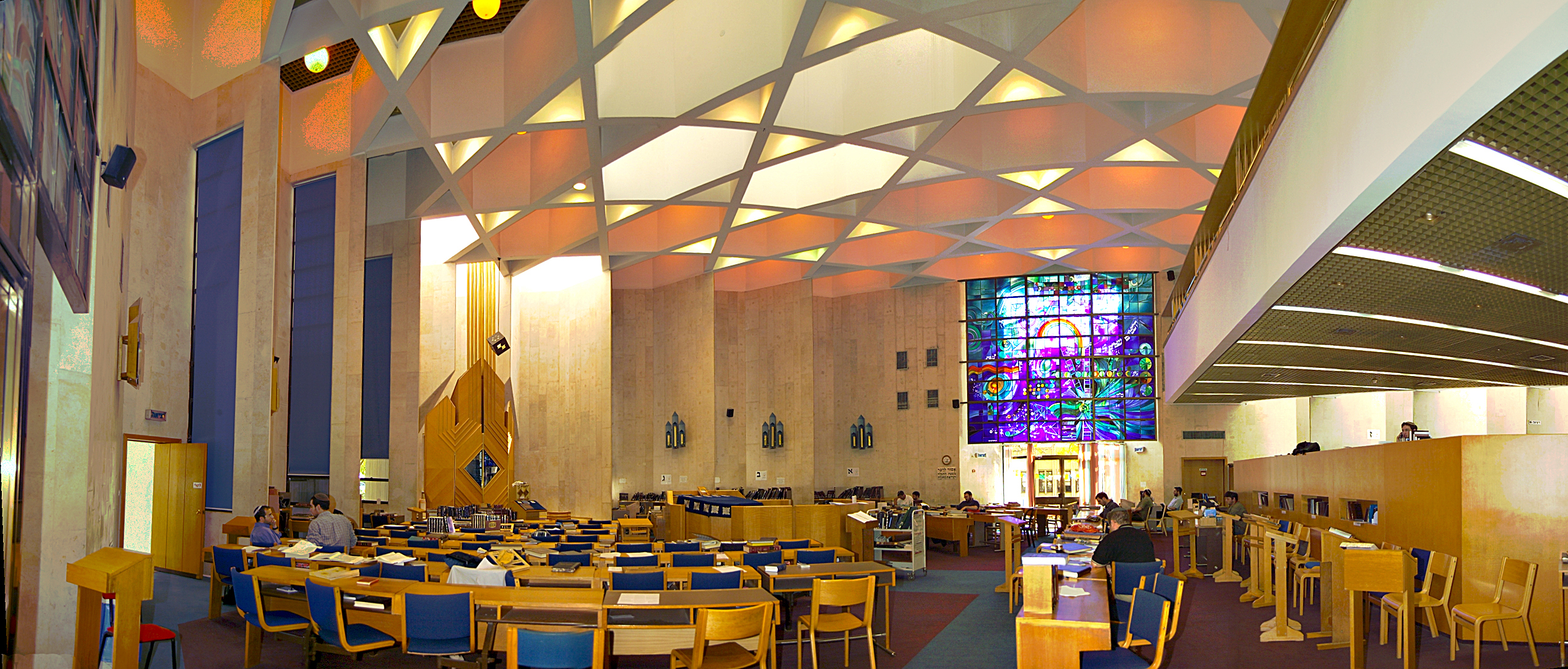 machon synagogue